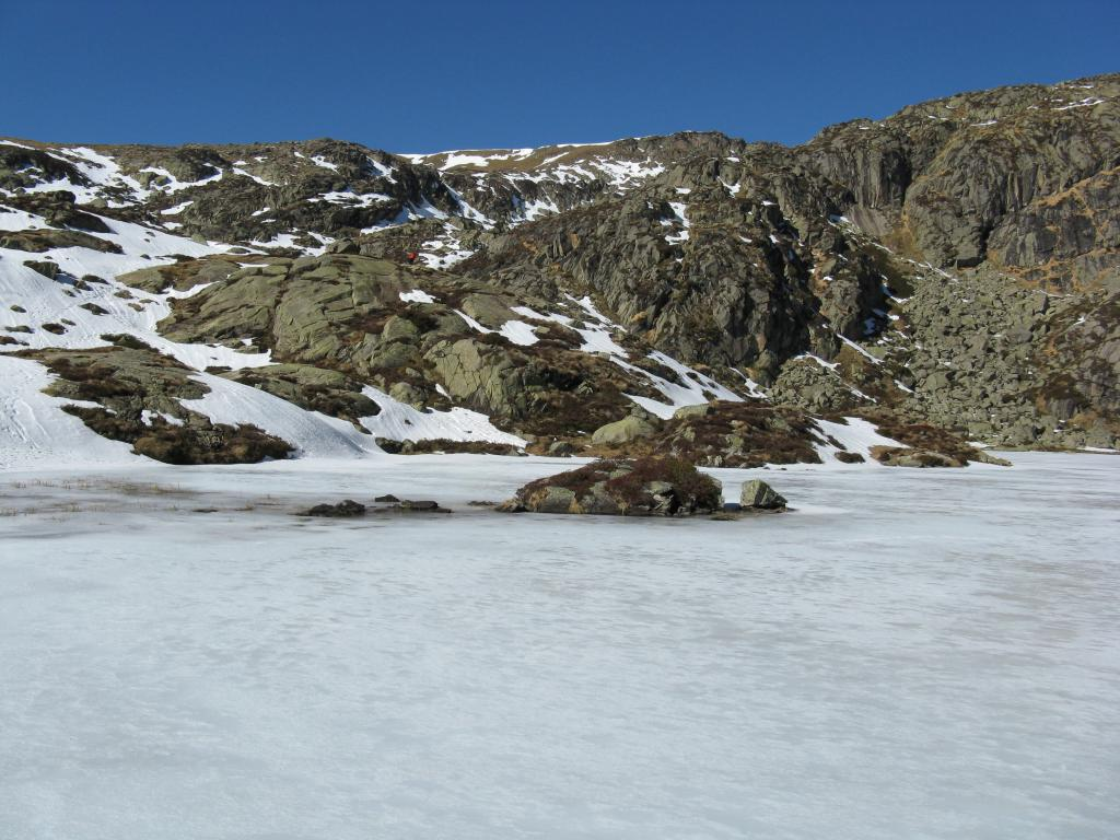 Vue sur l'Etang d'Arbu gelé Galerie photo